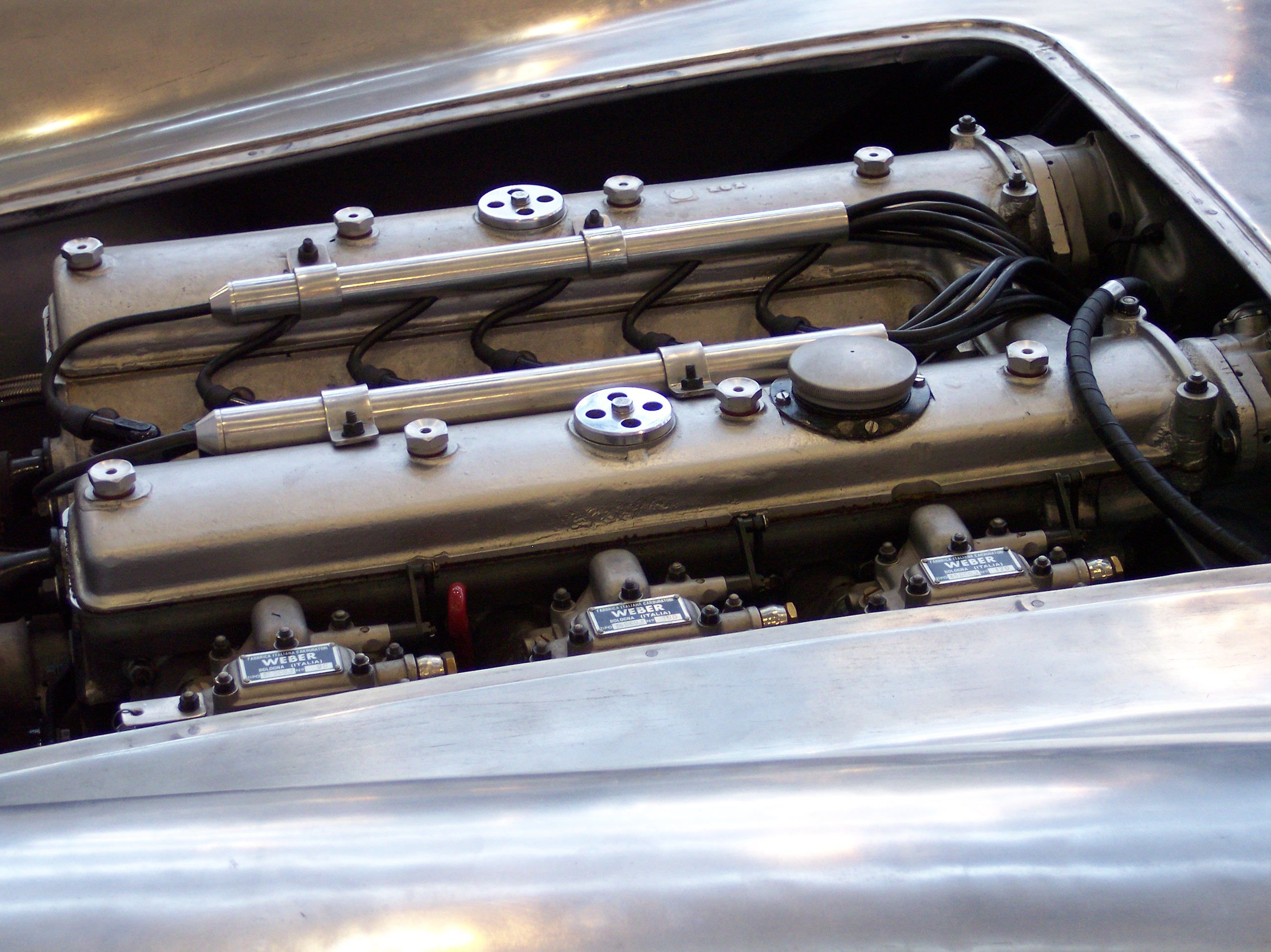 AWE 1955 engine